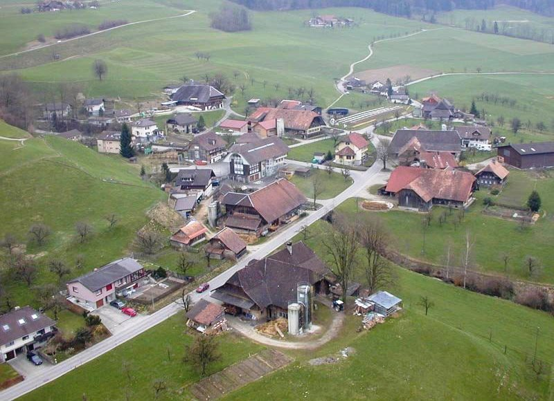 Freimettigen Dorf-Ansicht